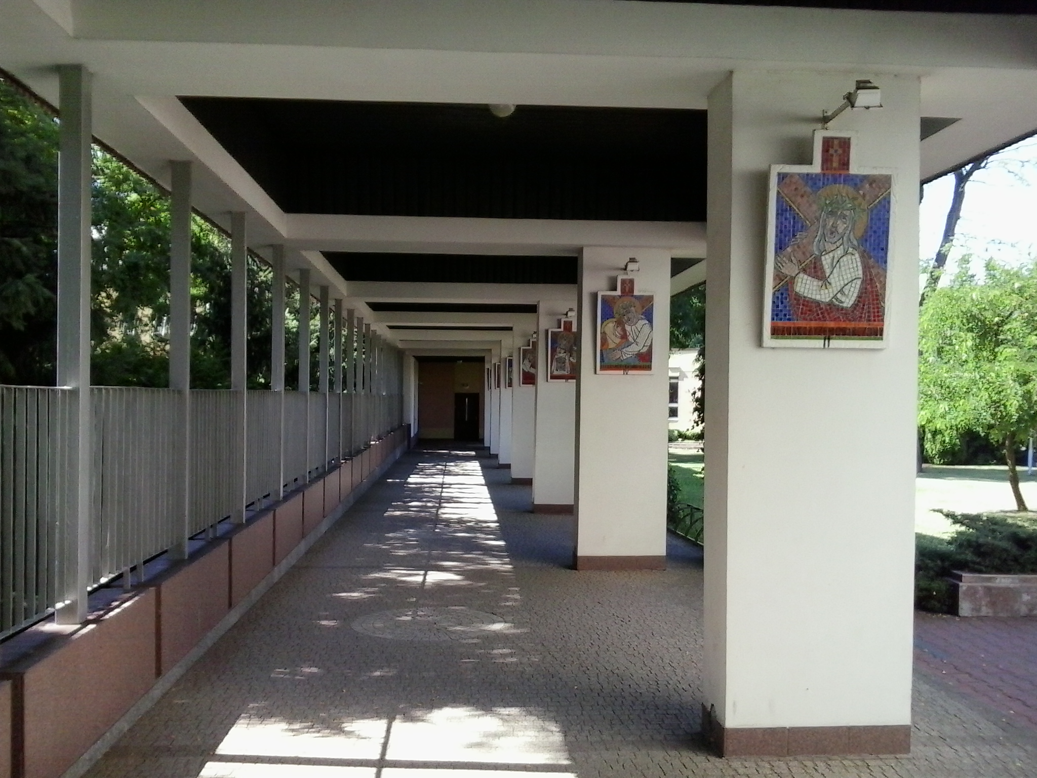 Kościół Św. Rodziny - Poznań, os. Kopernika.